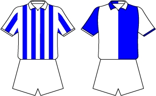 Descrição Ilustração do uniforme do Paissandu Atlético Clube, cidade do Rio de Janeiro. Licença